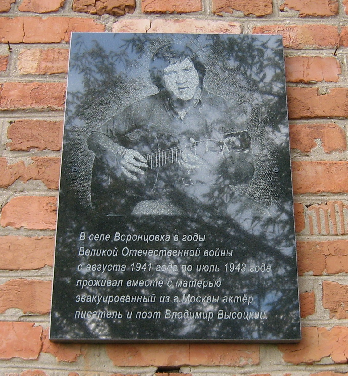 Мемориальная доска в селе Воронцовка Оренбургской области